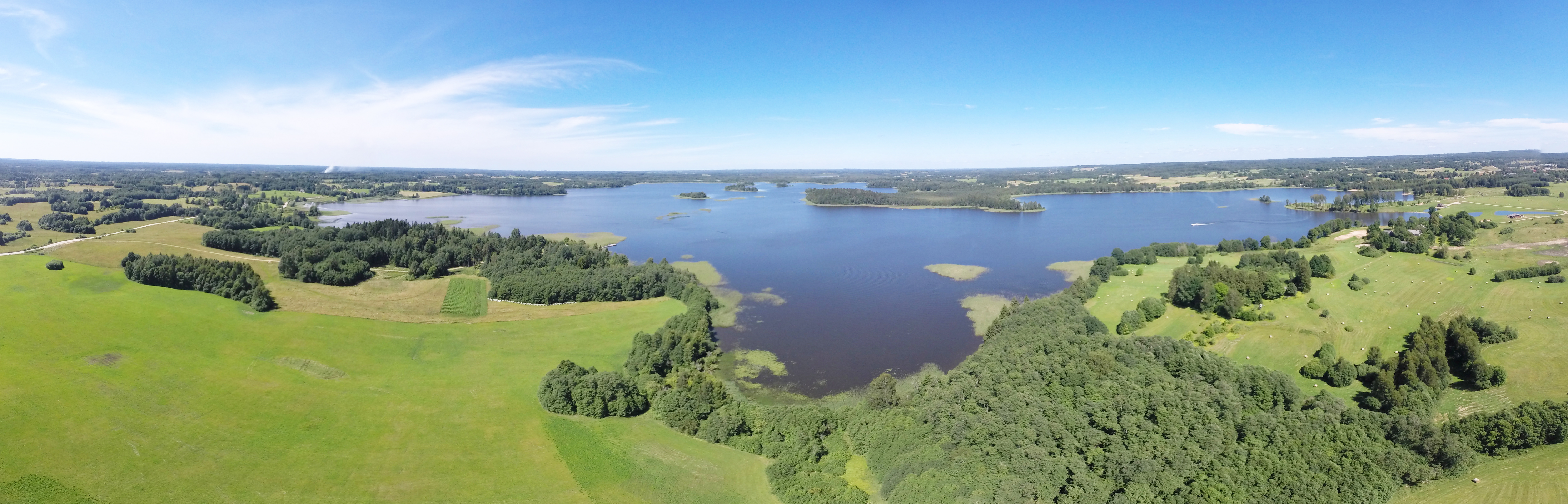 Ineša panorāma no putna lidojuma